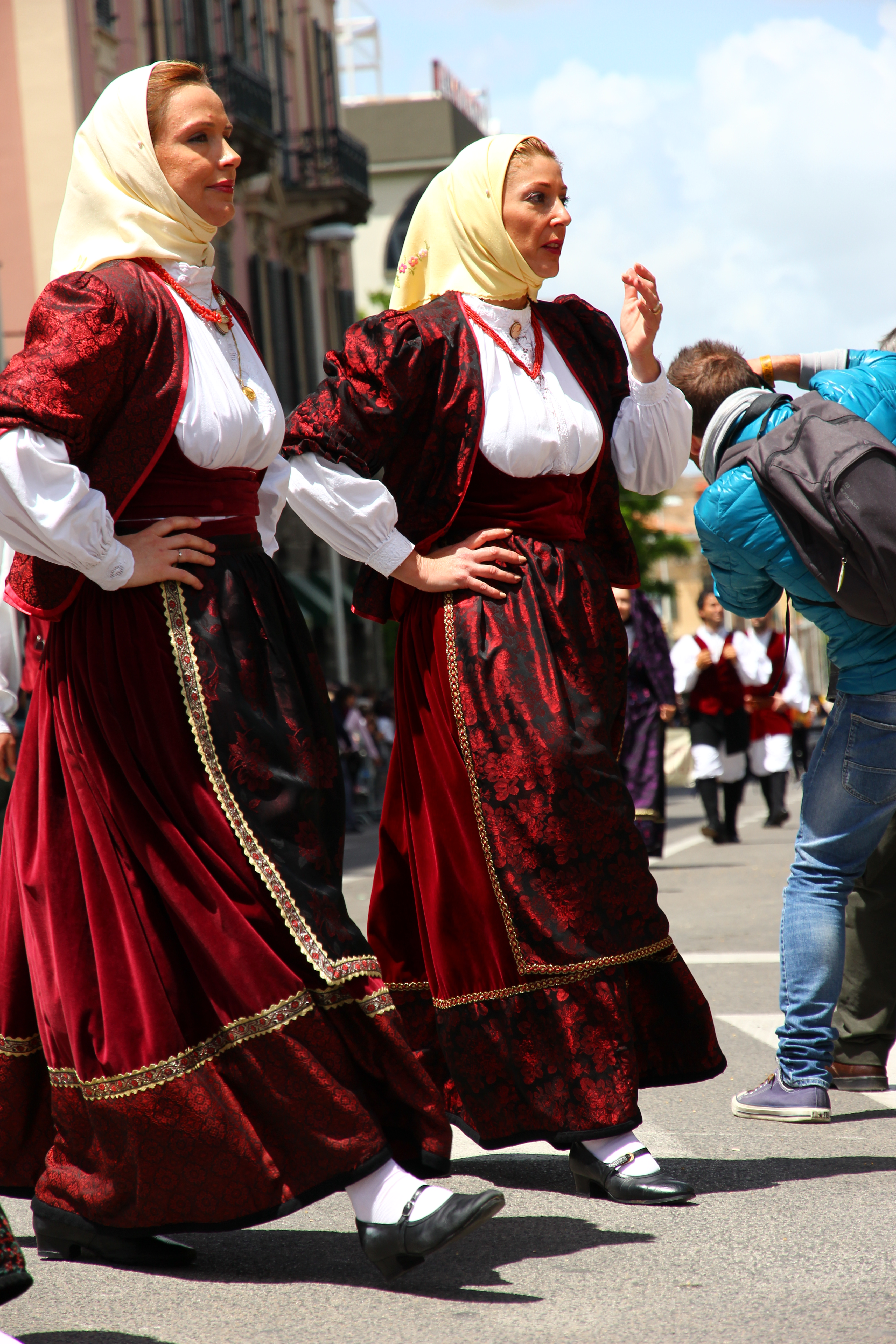 Cavalcata Sarda 2013 (Sassari)